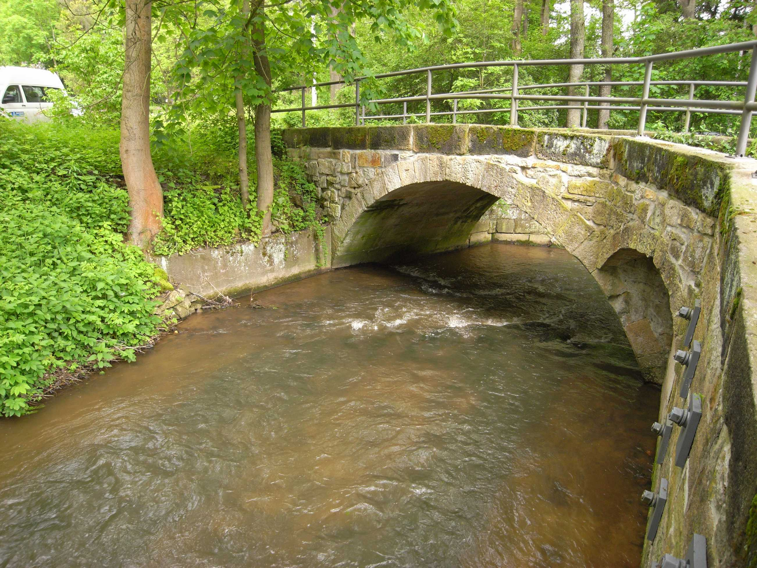 Lockwitzbach mit alter Brücke am Borthener Grund (Sachsen, Deutschland)